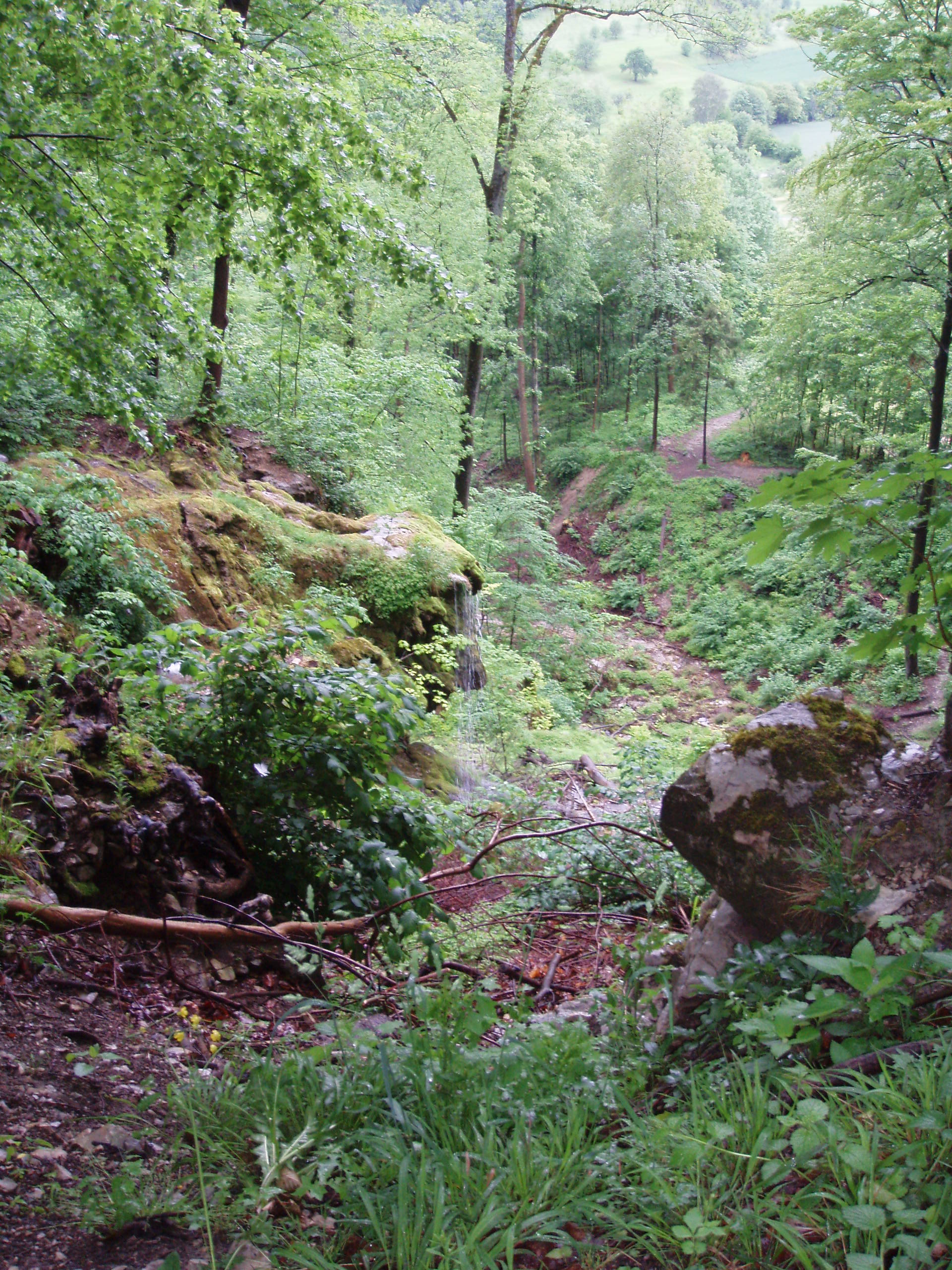 Neidlinger Wasserfall, Schwäbische Alb, Baden-Württemberg, Deutschland